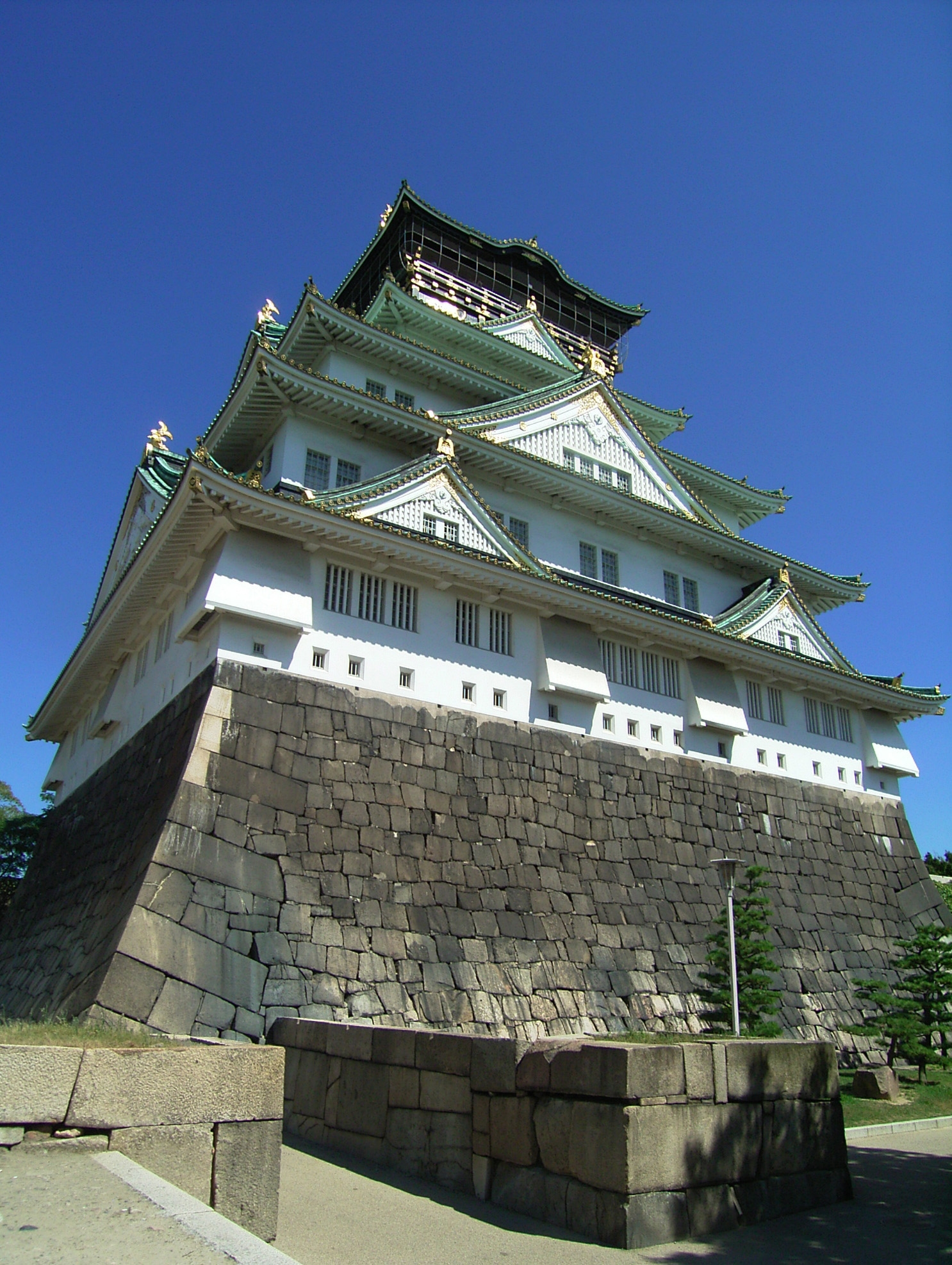 OsakaCastle